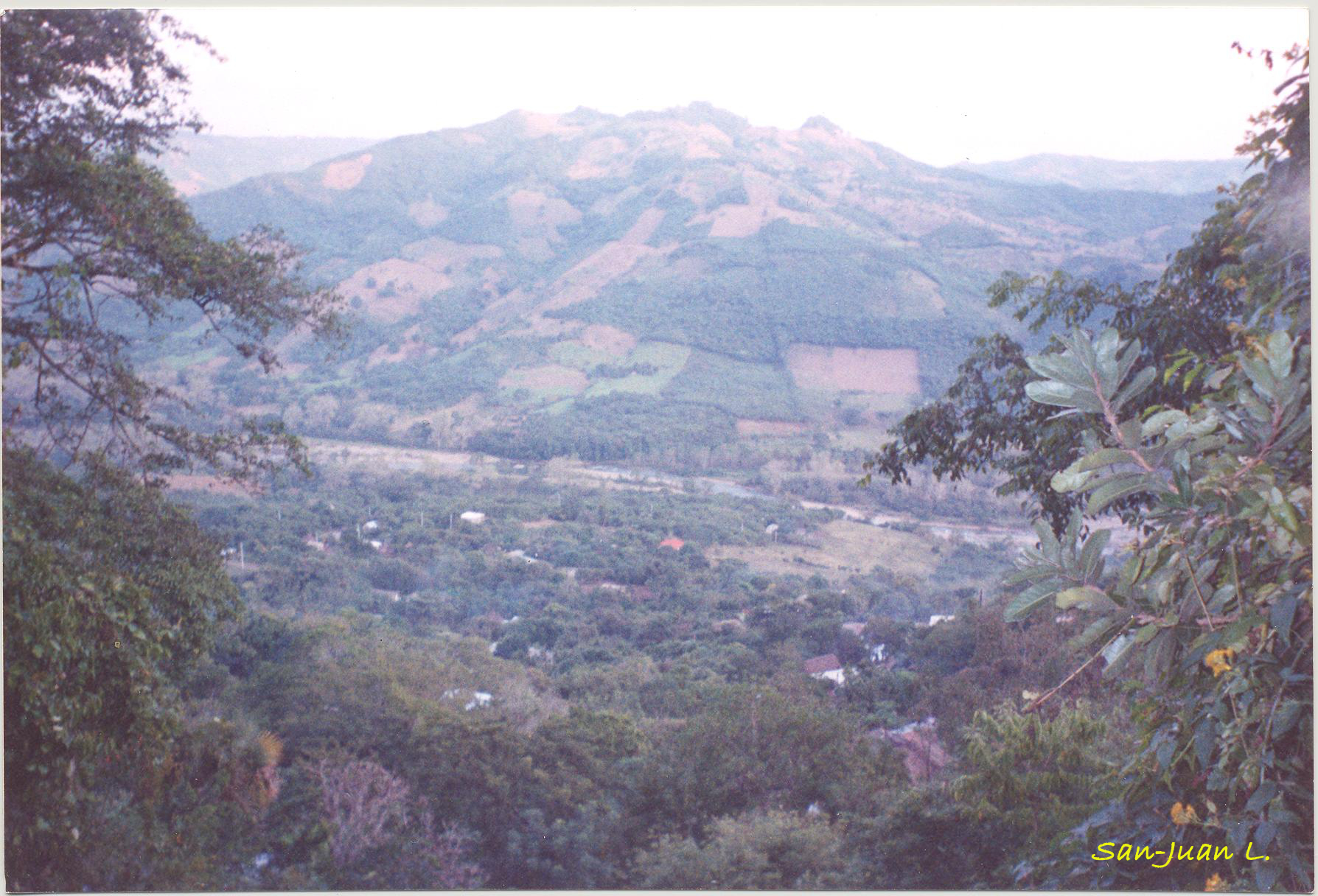 Vista panorámica de Pahactla